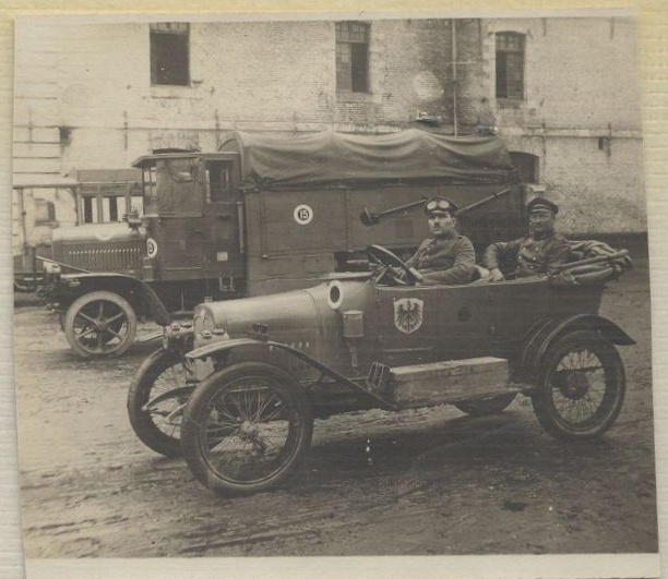 Deutsche Militärfahrzeuge Erster Weltkrieg. Im Vordergrund: Wanderer Puppchen.